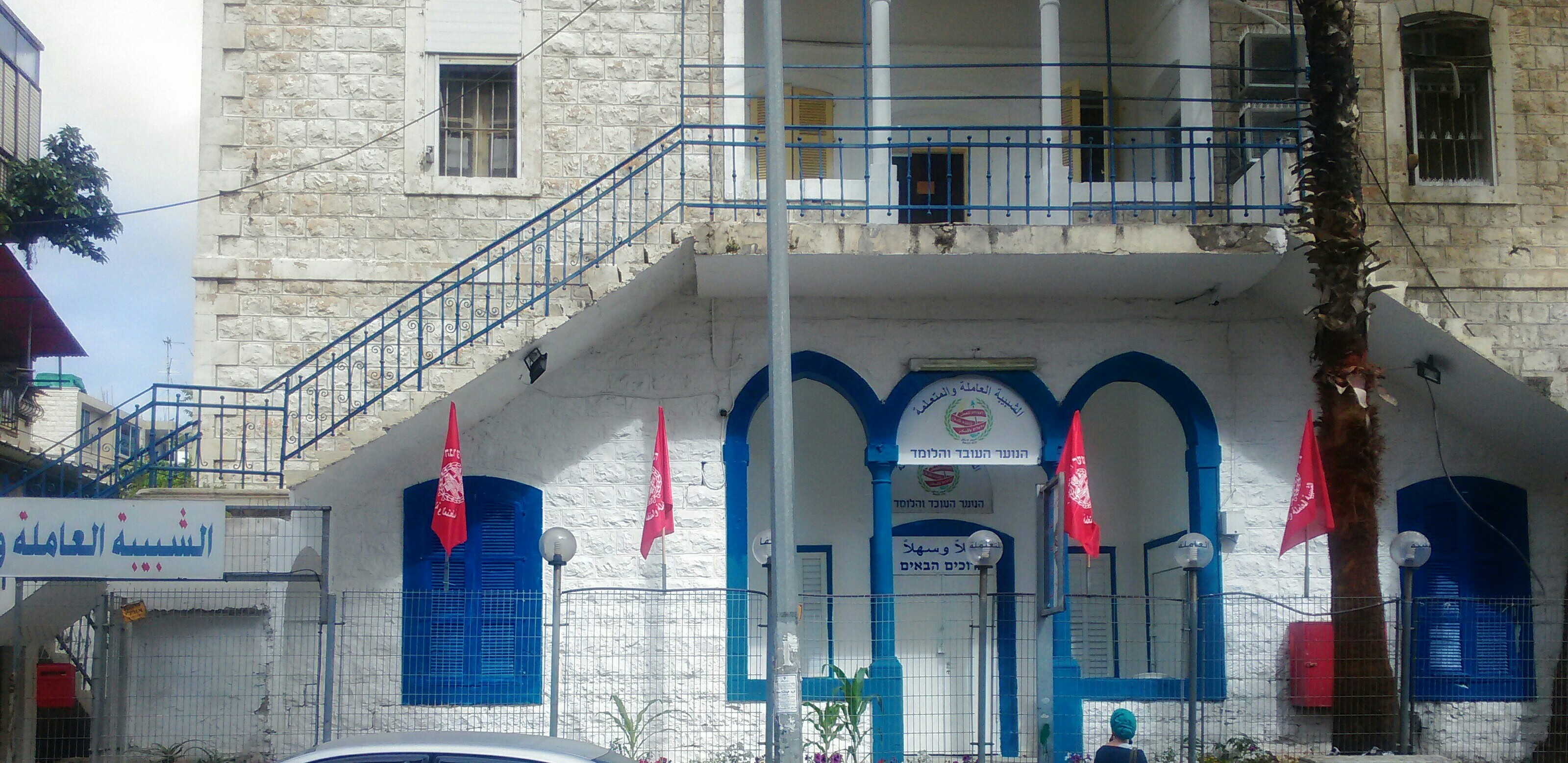 קן הנוער העובד והלומד, שדרות הציונות חיפה, 2017